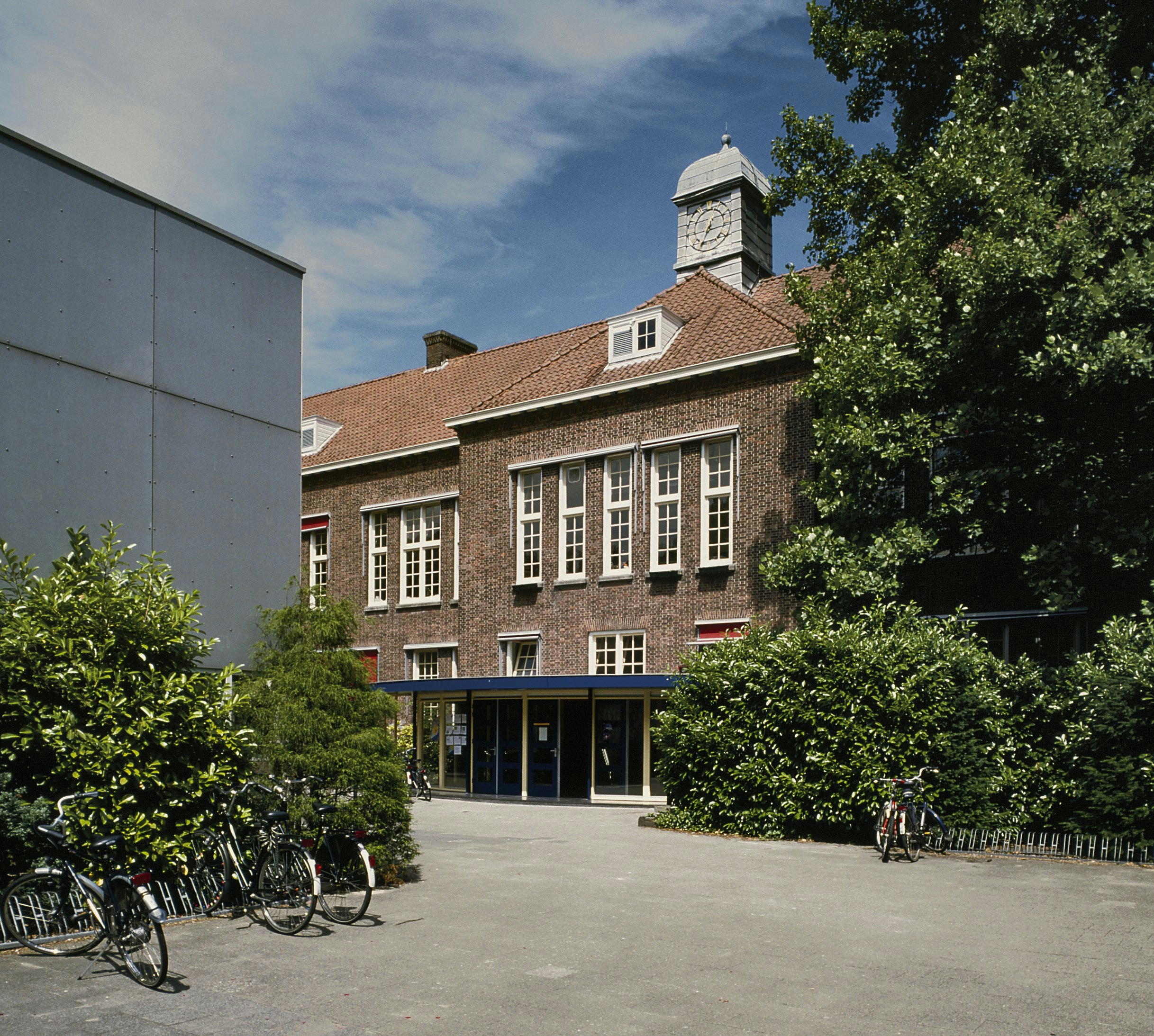 Van Oldenbarnevelt-Gymnasium: Entree (opmerking: Gefotografeerd voor ANWB Monumentenboek)